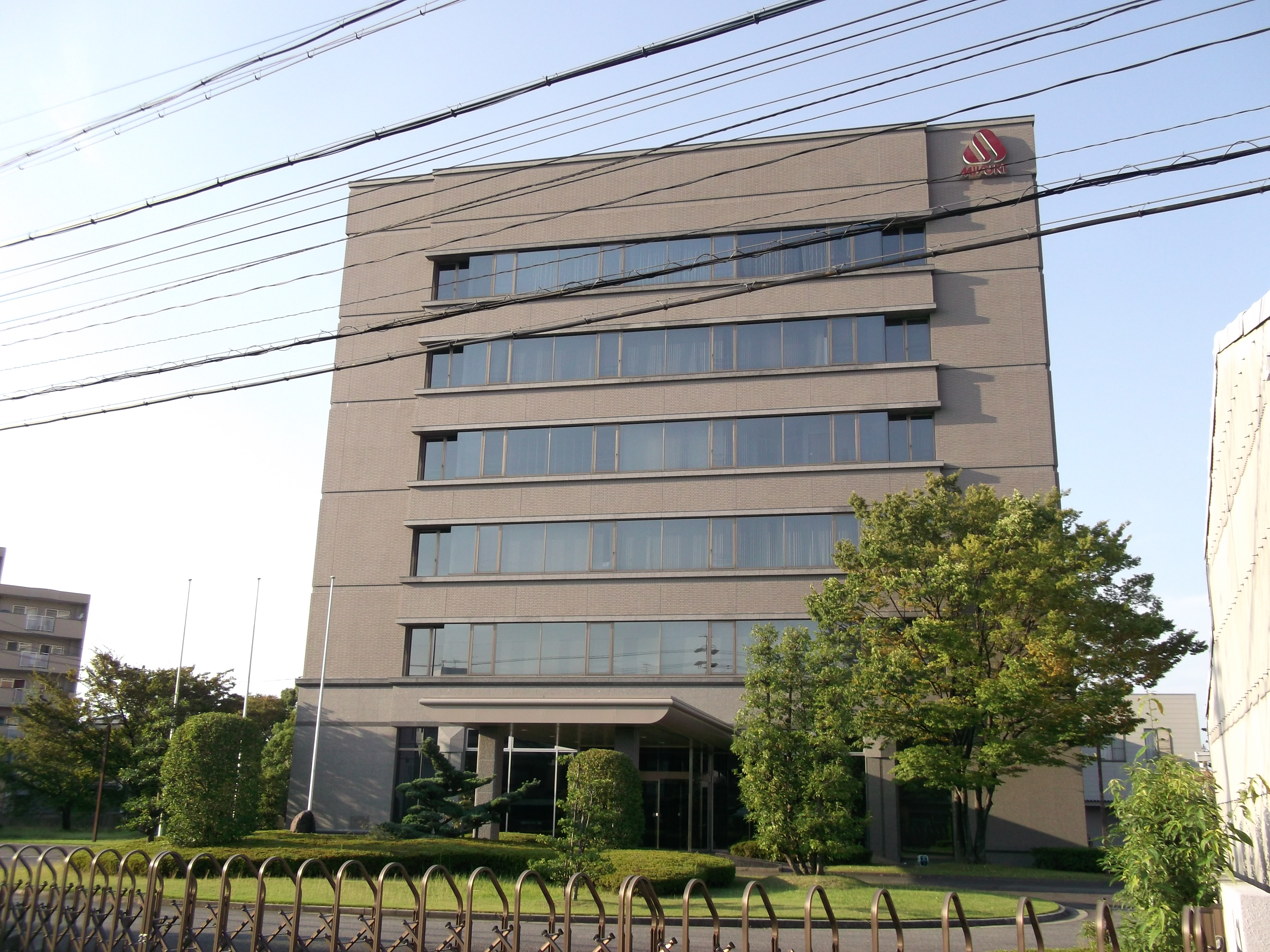 名古屋市西区市場木町の御幸毛織本社ビルを南側公道より撮影